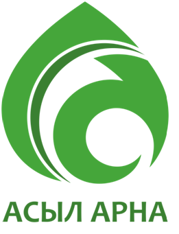 Үшінші логотип